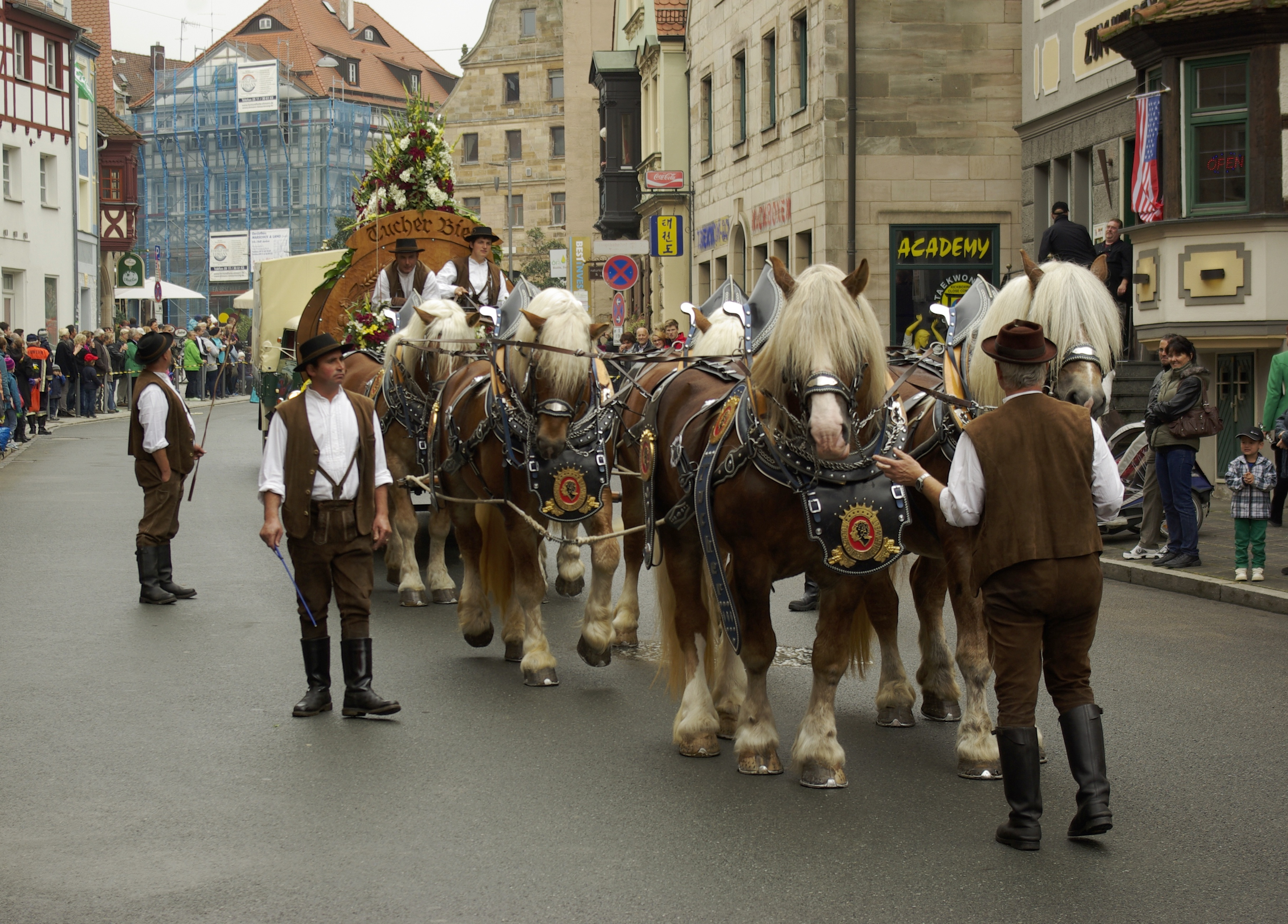 Bierwagen der Tucher Bräu mit sechs rheinländischen Kaltblütern auf dem Erntedankfestzug der Michaeliskirchweih in Fürth